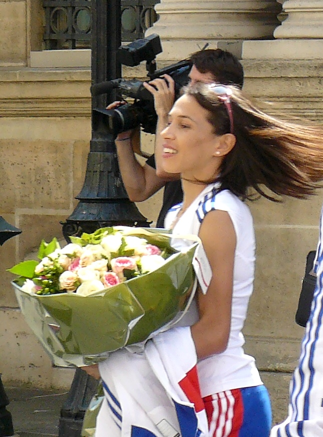 Hind Dehiba, athlète française (demi-fond), lors de la réception à l'Élysée des médaillés de Barcelone , le 3 août 2010.